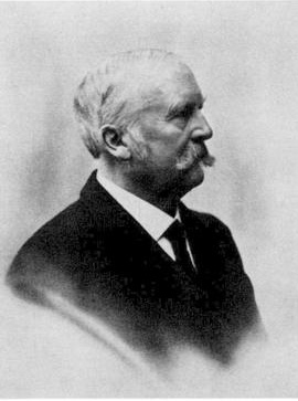 Percy F Luck (1844-1915)